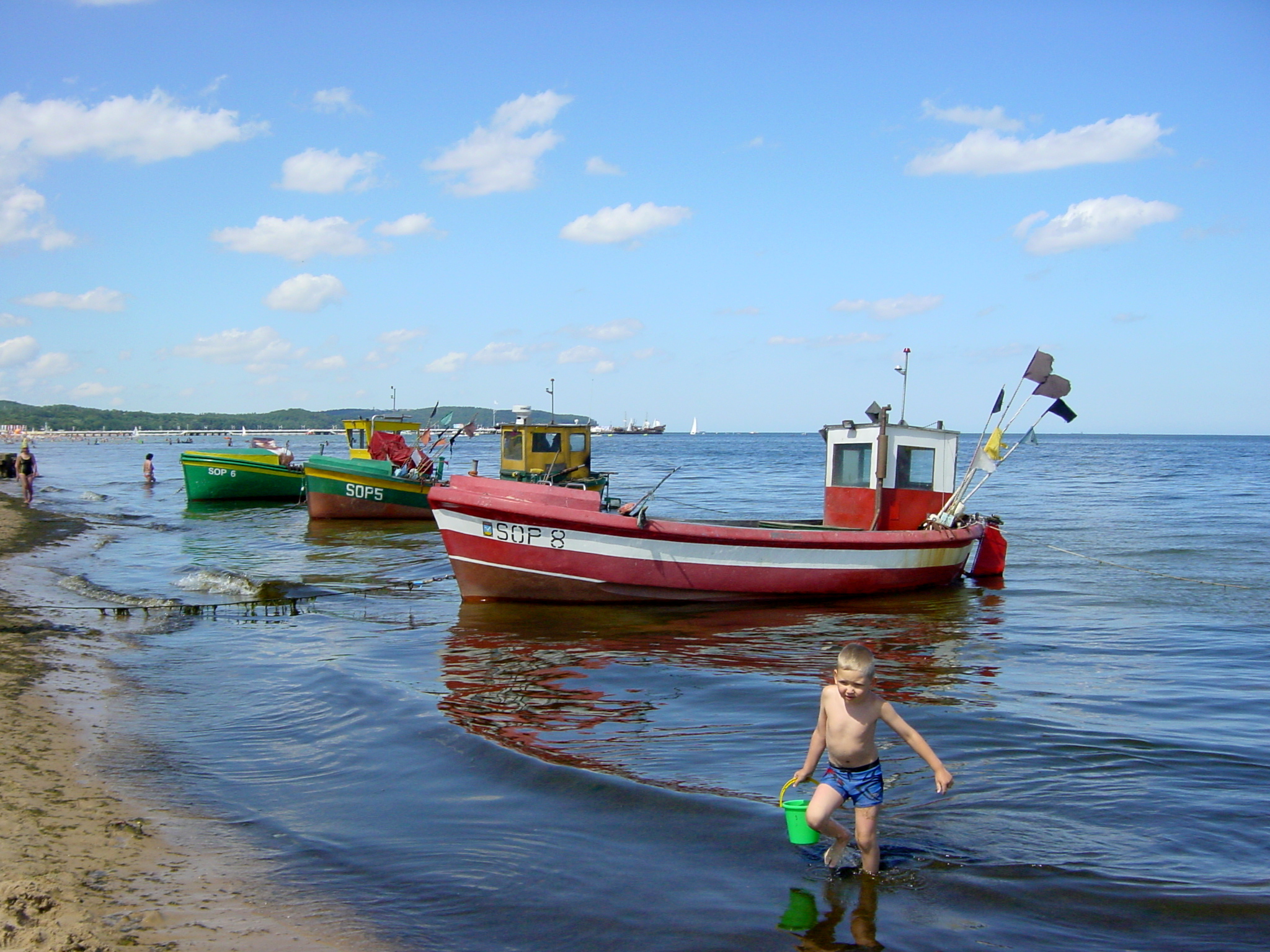 Plaża w Sopocie, kutry rybackie